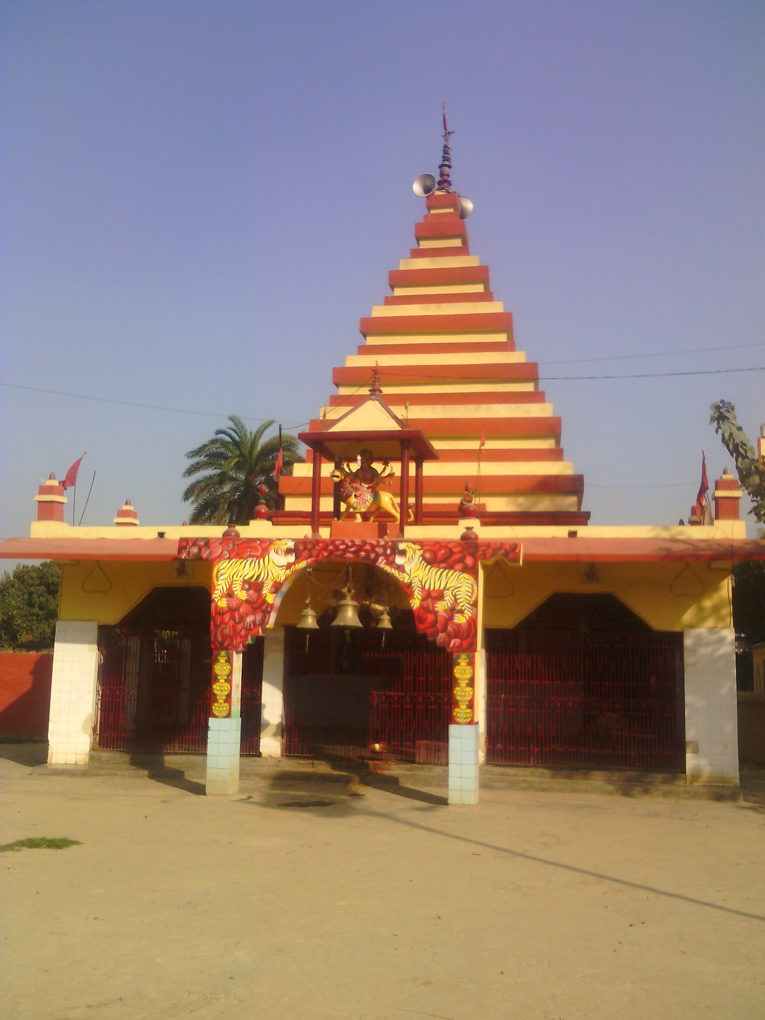 नवटोल, सरिसबपाही